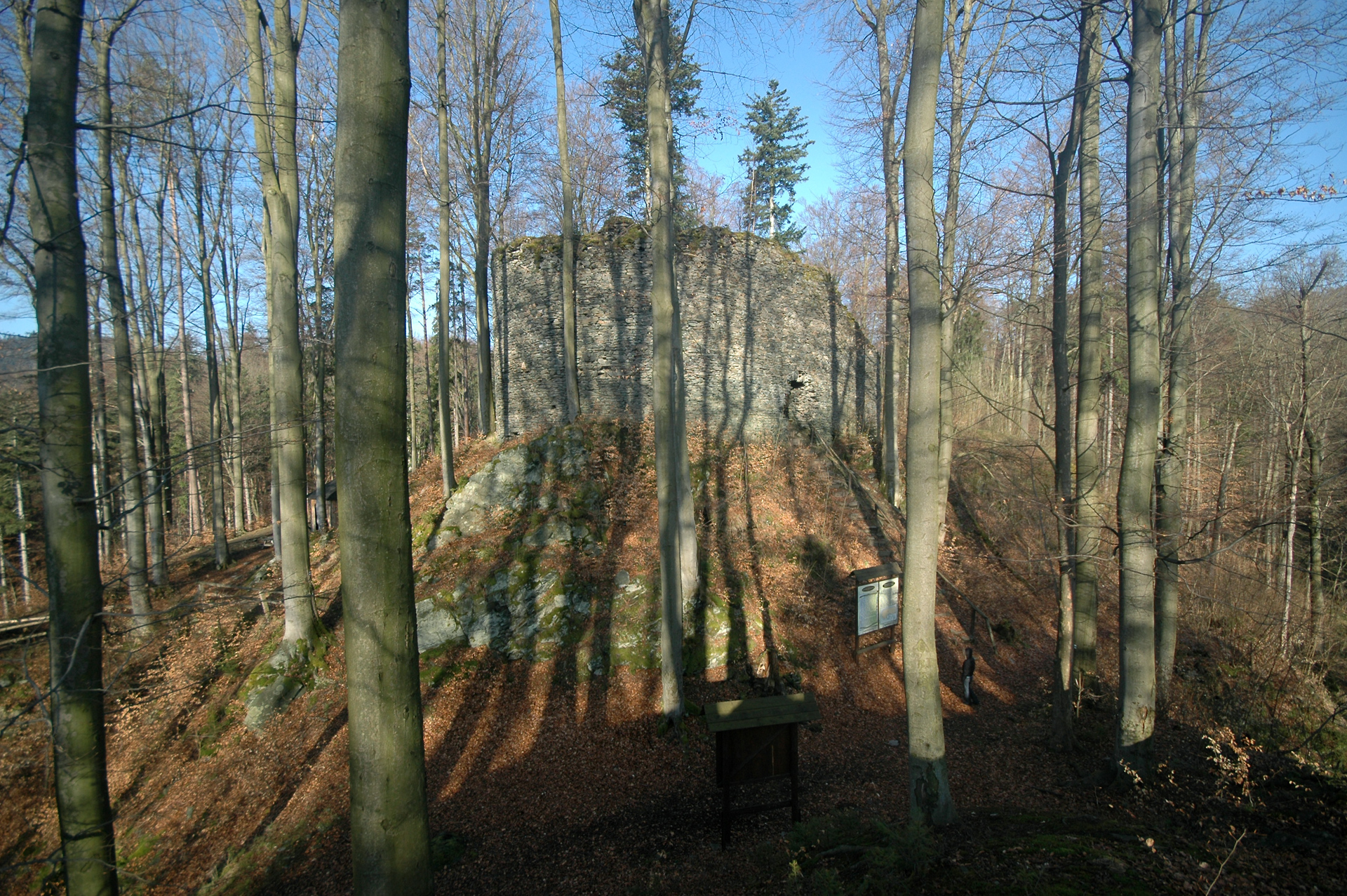 Ruine Burg Schnallenstein (14./15. Jh.), Habelschwerdter Gebirge, Niederschlesien, Polen.